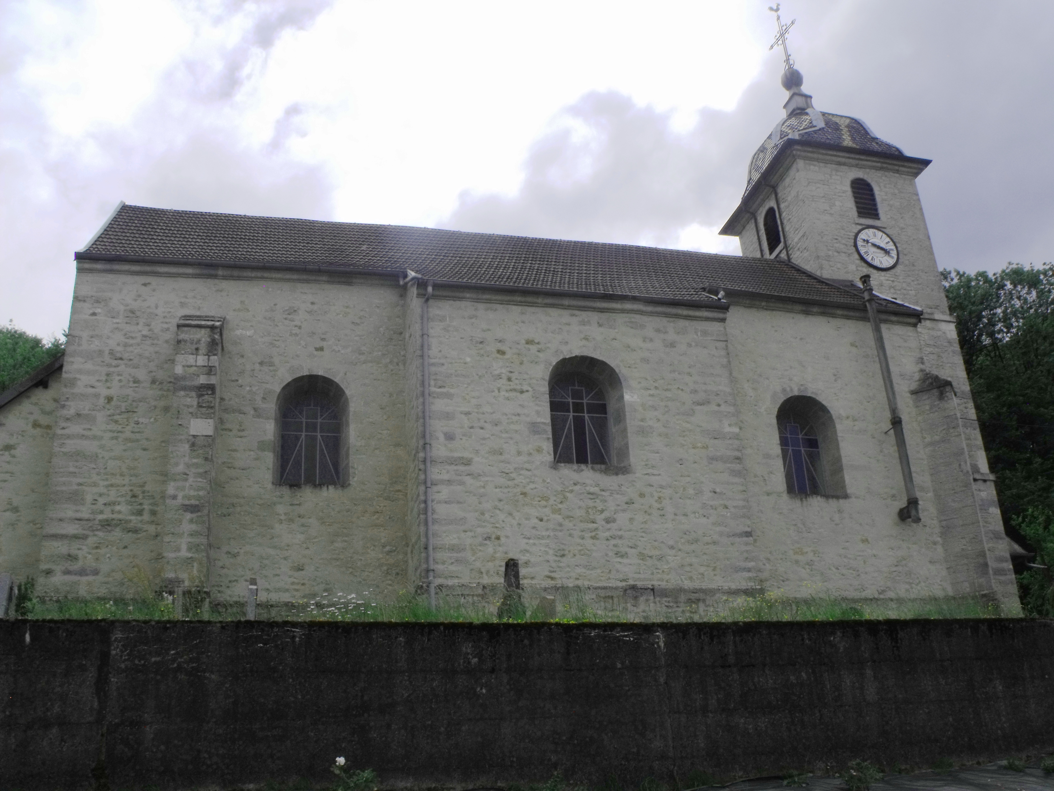 église de Saint-Georges-Armont, Doubs, France